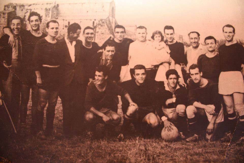 Formazione del Tuscania Calcio nella stagione 1946-1947